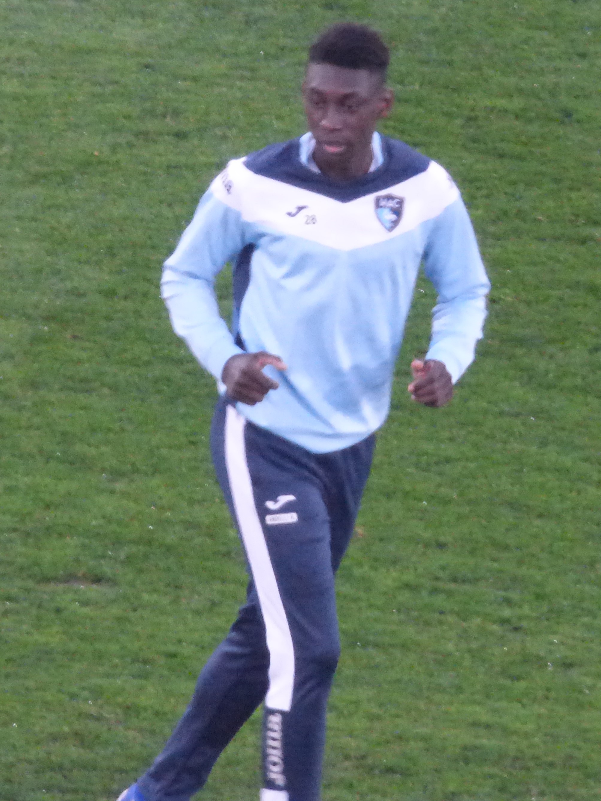 Alimami Gory avant le match Lens / Le Havre, comptant pour la 30ème journée du championnat de France de Ligue 2 2018-2019, le 1er avril 2019 au Stade Bollaert-Delelis.